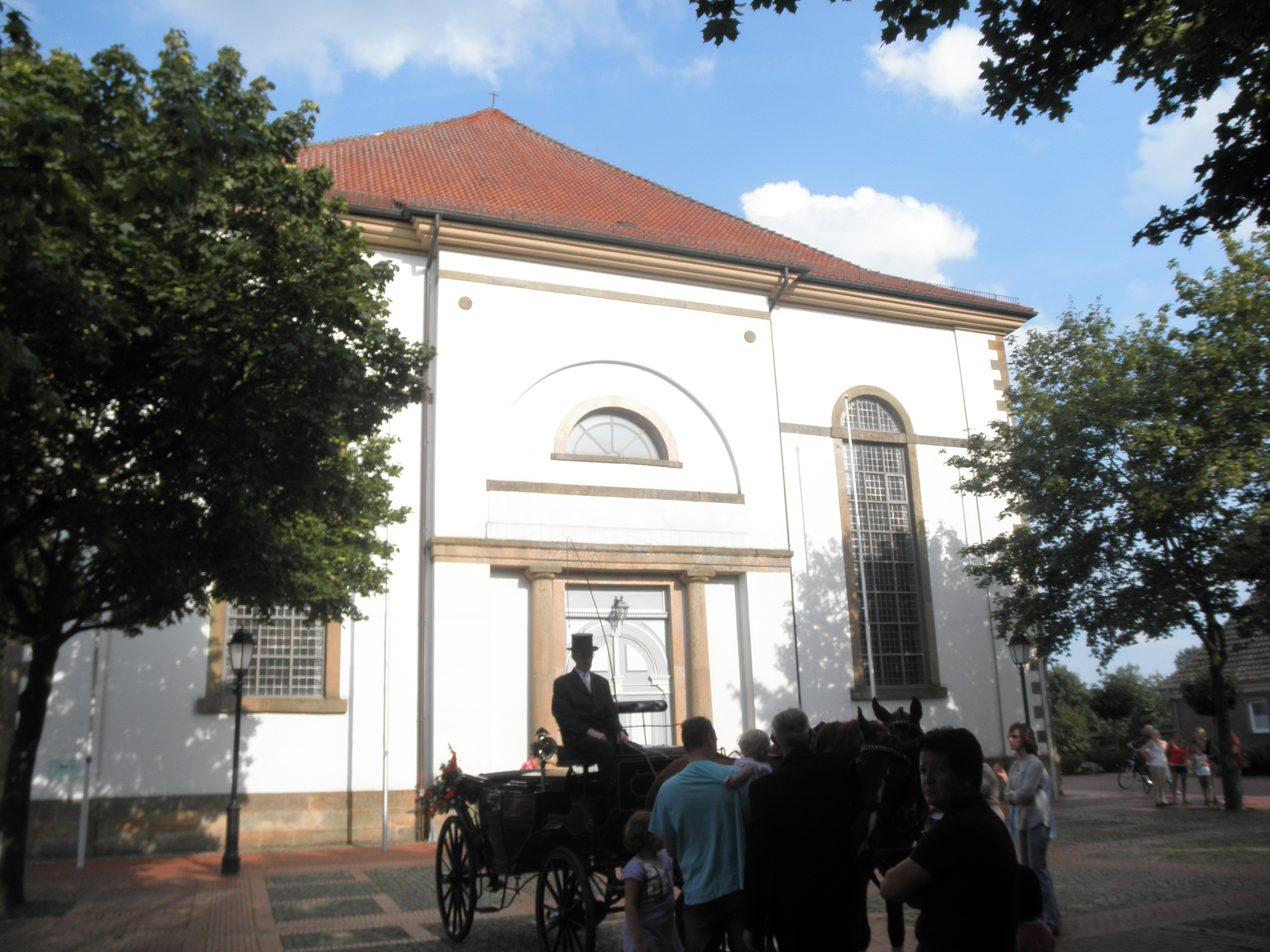 preĝejo St. Vitus en Löningen, Germanio